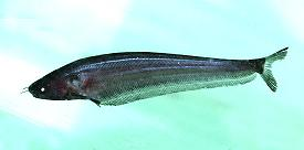 ดังแดง สัญญาอนุญาต